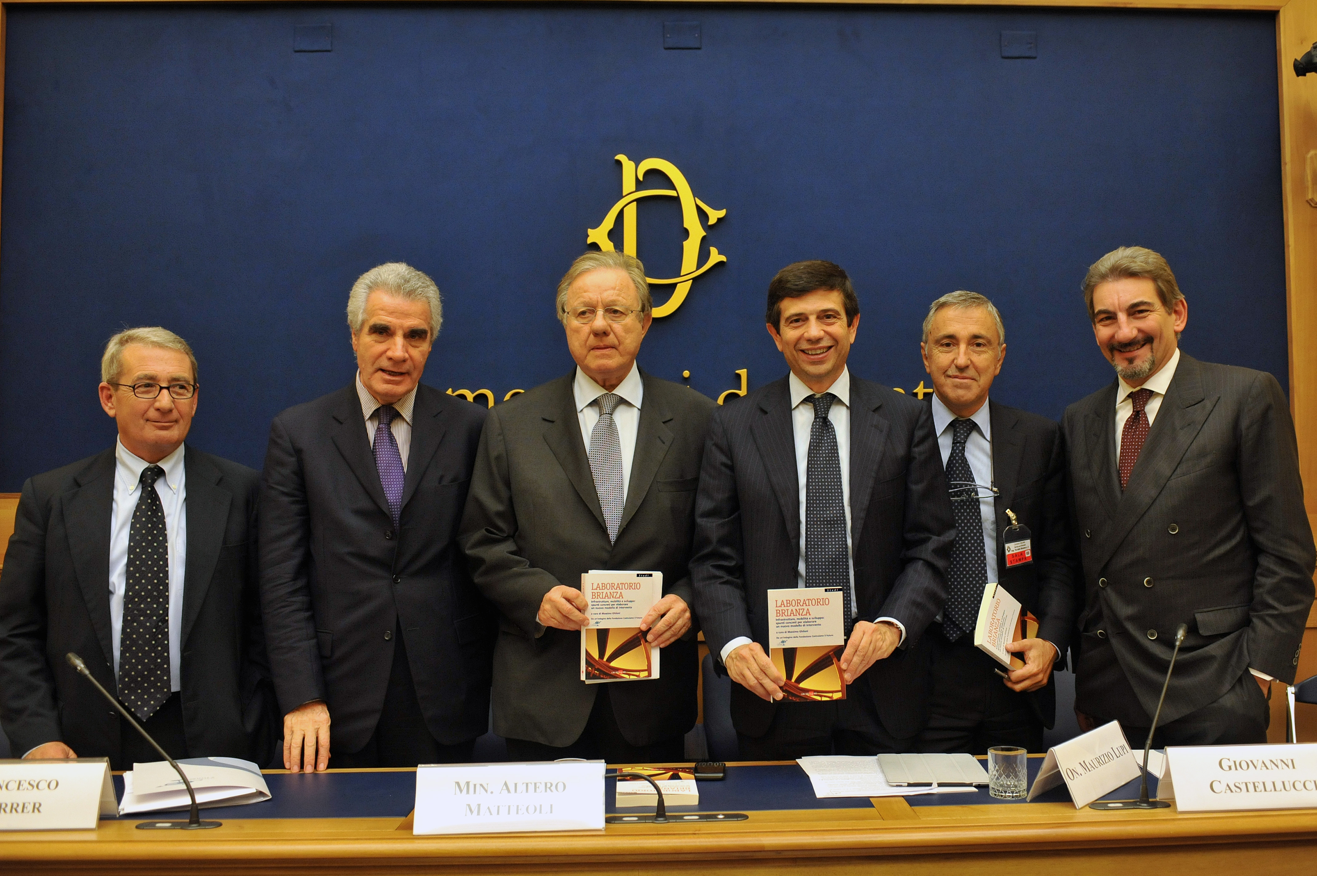 19 ottobre 2011, Roma: la presentazione della Ricerca sulle infrastrutture con il Ministro Matteoli. Maurizio Lupi, Vice Presidente della Camera; Francesco Karrer, presidente del Consiglio superiore dei Lavori Pubblici; Giovanni Castellucci, amministratore delegato di Autostrade per l’Italia spa; Massimo Ghiloni, direttore area legislazione mercato privato dell’Ance e Raffaele Cattaneo Assessore alle infrastrutture e mobilità Regione Lombardia.